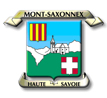 Logo de la mairie de Mont-Saxonnex